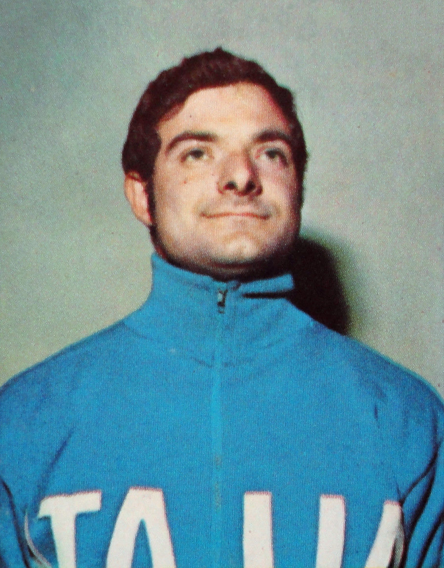 CAMPIONI DELLO SPORT 1968/69-n.65-ROBERTO VEZZANI-ITALIA-rec